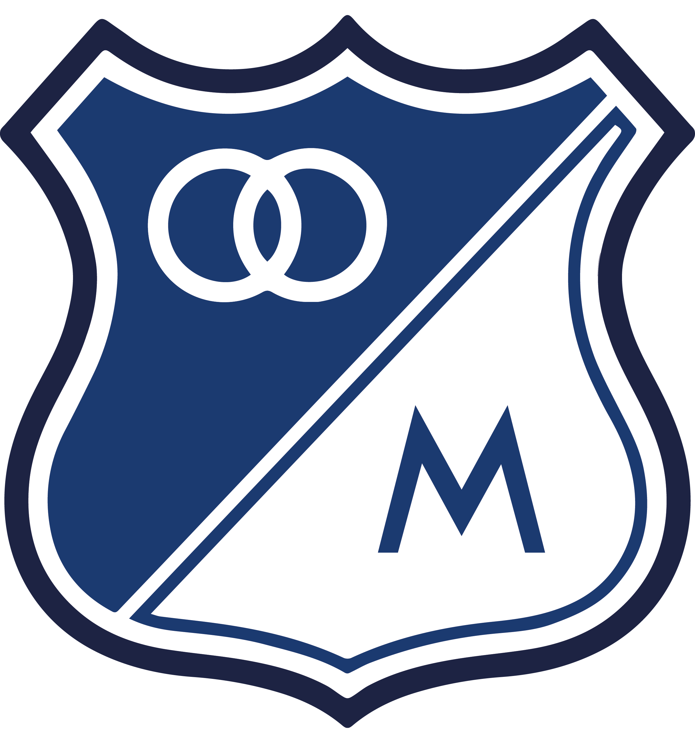 Diseño de escudo usado por millonarios en competiciones 2017 y 2018.